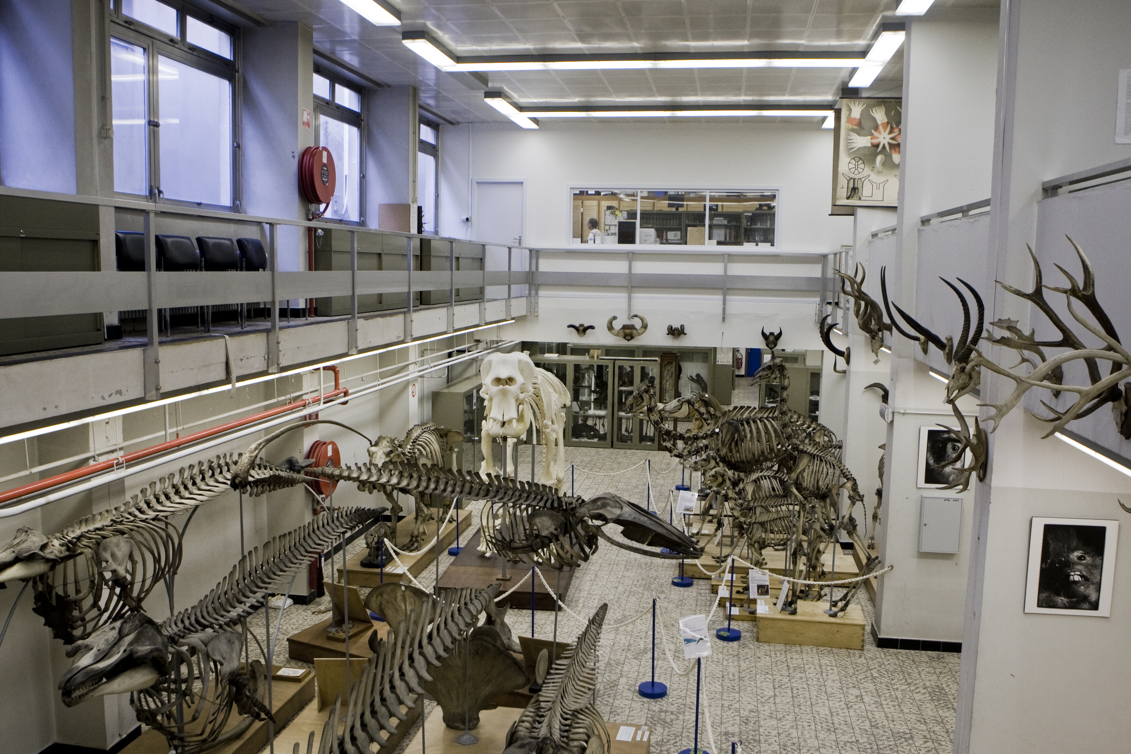 Foto van Museum voor Dierkunde - Universiteit Gent. Foto gedoneerd door UGentMemorie; fotografie Pieter Morlion